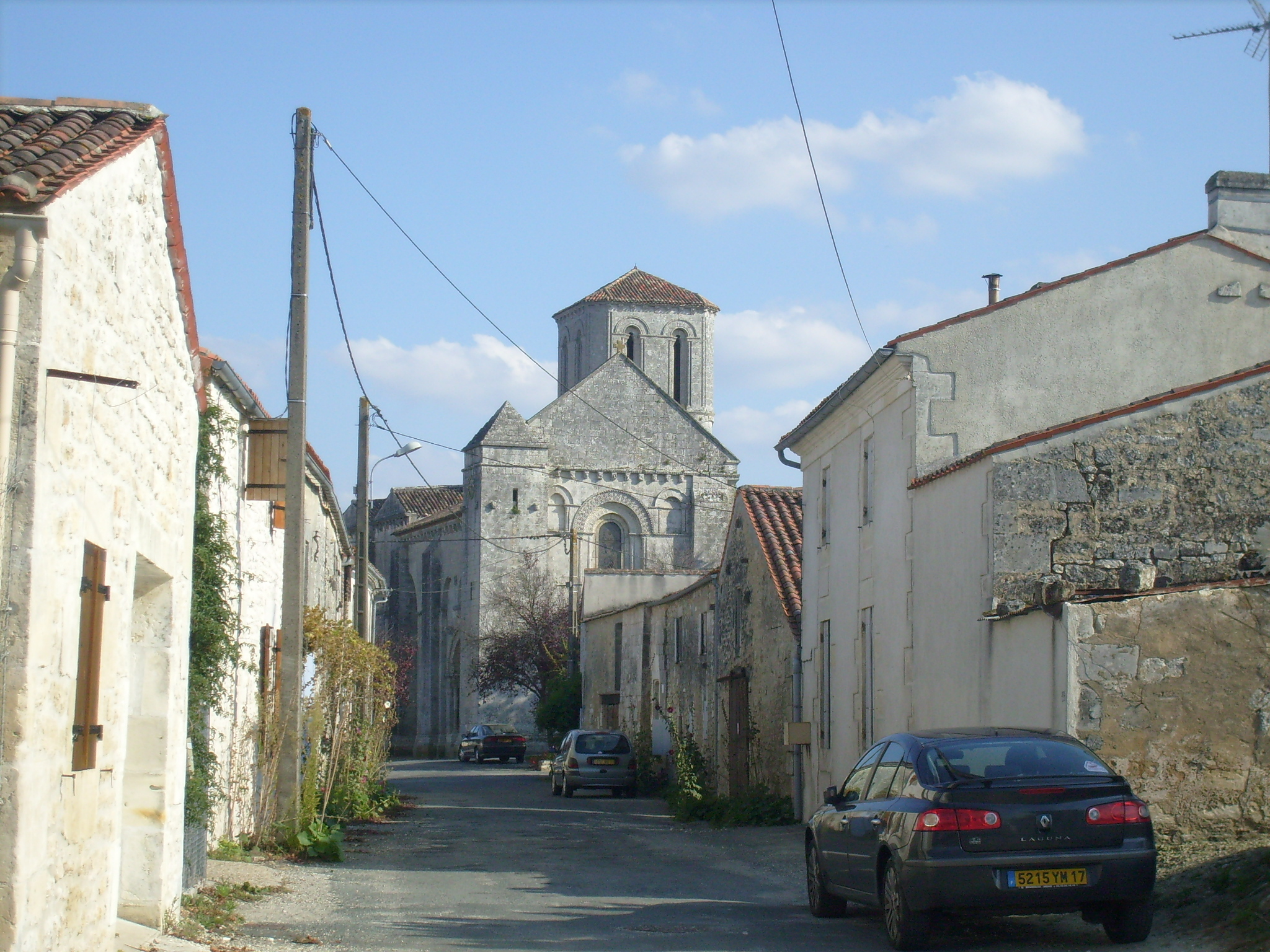 Village de Champagne